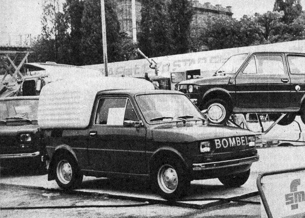 Fiat 126p Bombel na Międzynarodowych Targach Technicznych w Poznaniu - czerwiec 1974 r.